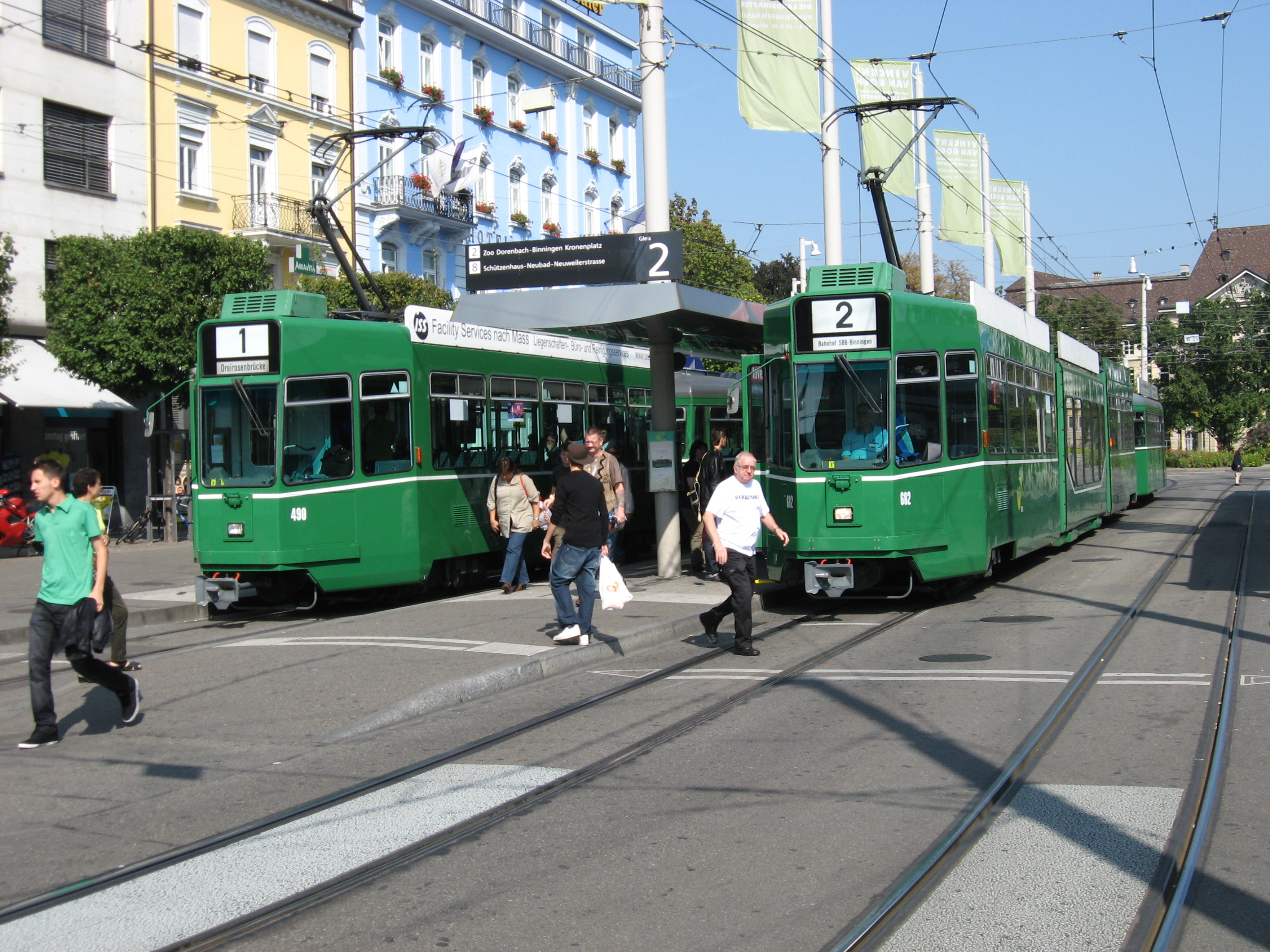 Trams bij de Basel SBB haltes